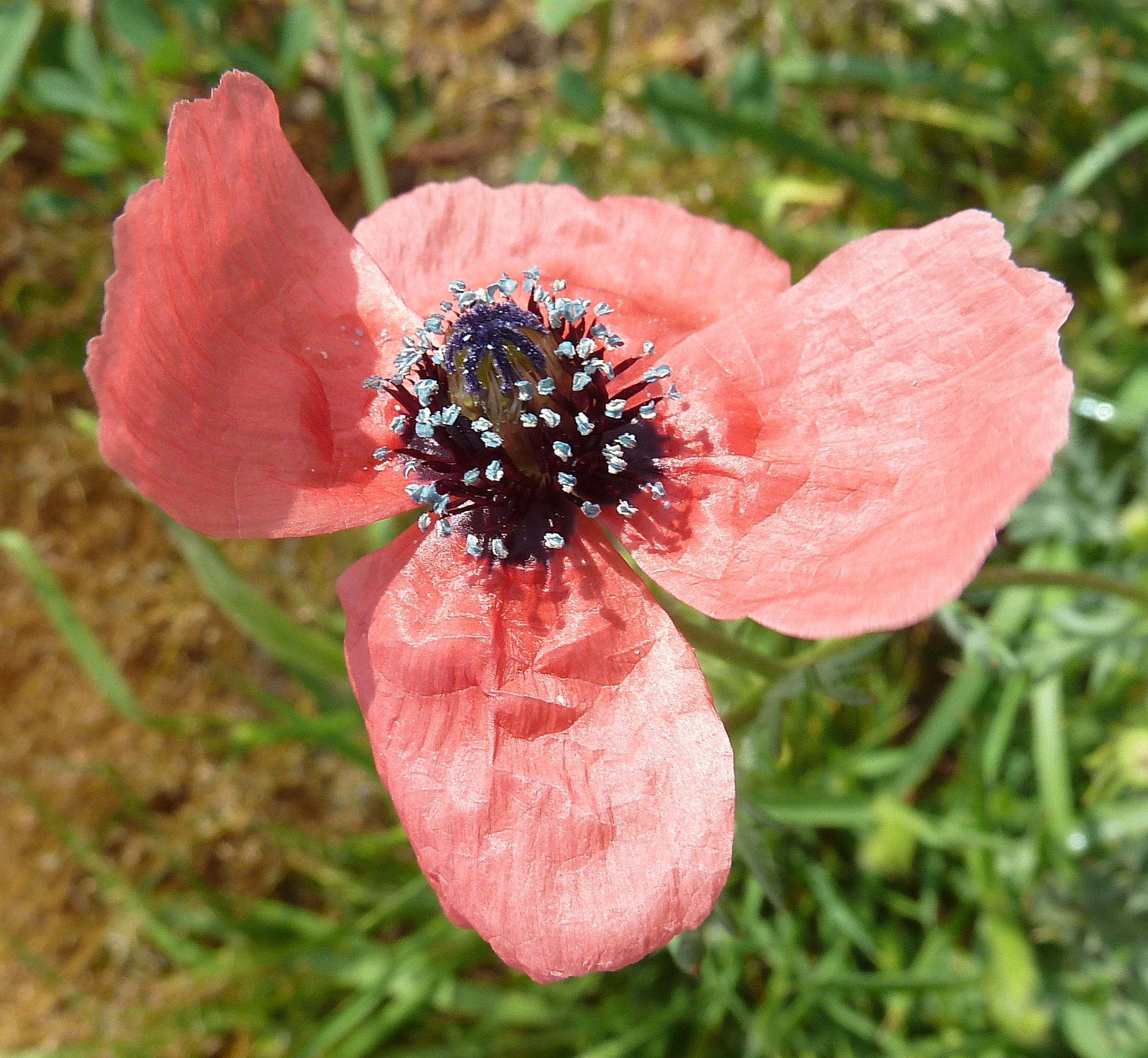 Papaver hybridum (Amapola triste) - Flor - Camino de la Azarbe de Patricio, Albatera (Alicante, España)